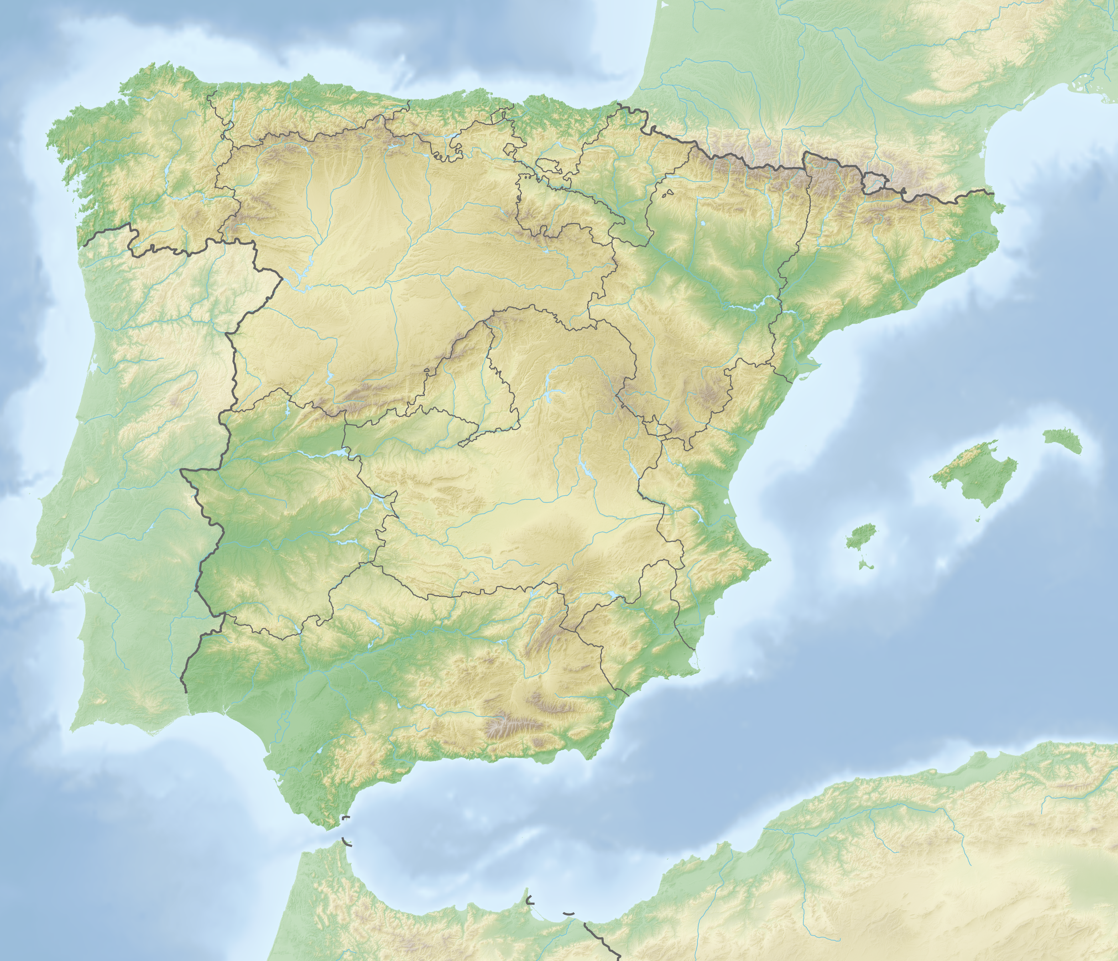 Reliefkarte Spanien Topographischer Hintergrund: NASA Shuttle Radar Topography Mission (public domain). SRTM3 v.2. Grenzen: Spain location map.svg